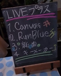 amiinaセトリボード(20150404(1))